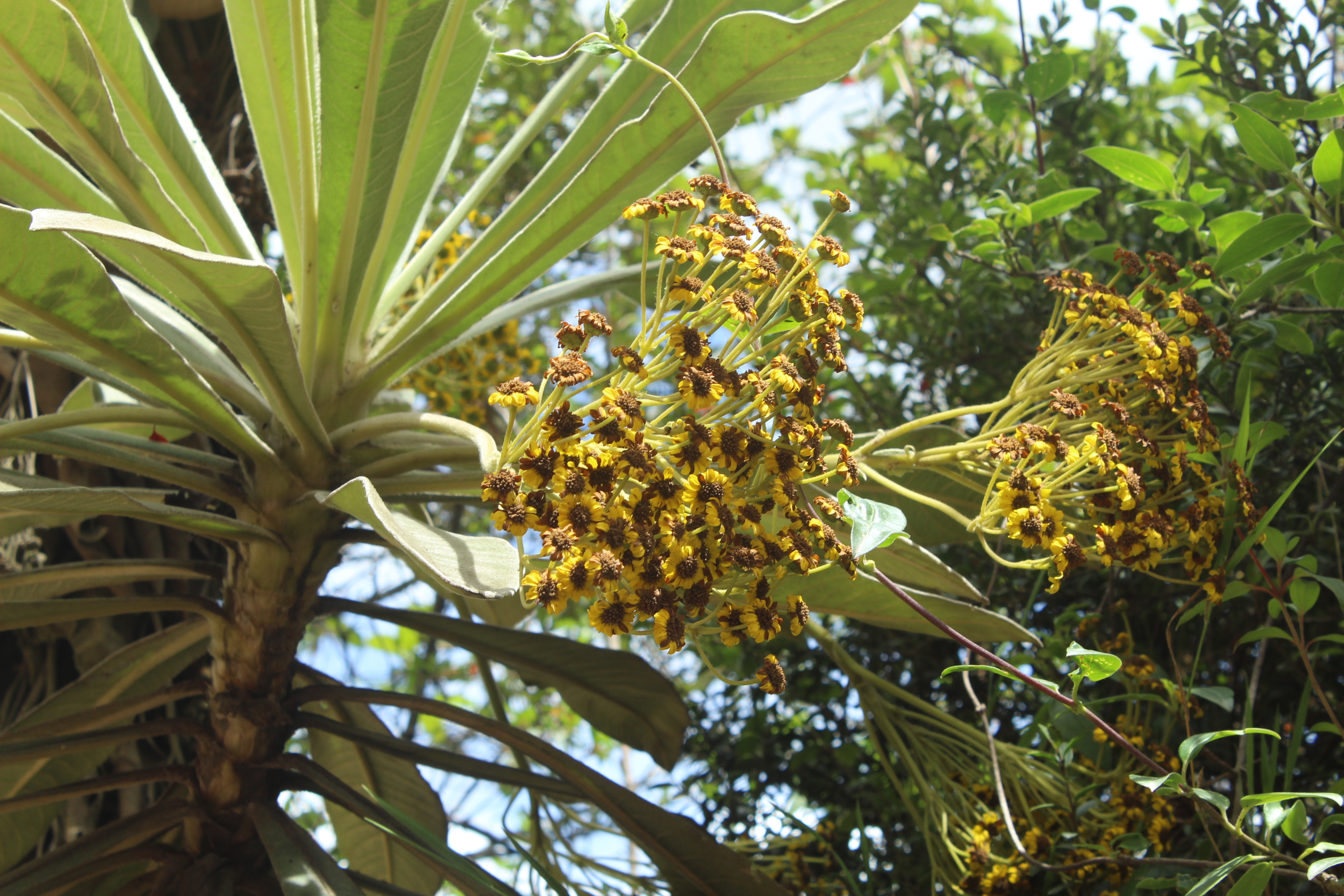 Flores de Espeletiopsis pleiochasia en Duitama, Boyacá, Colombia.